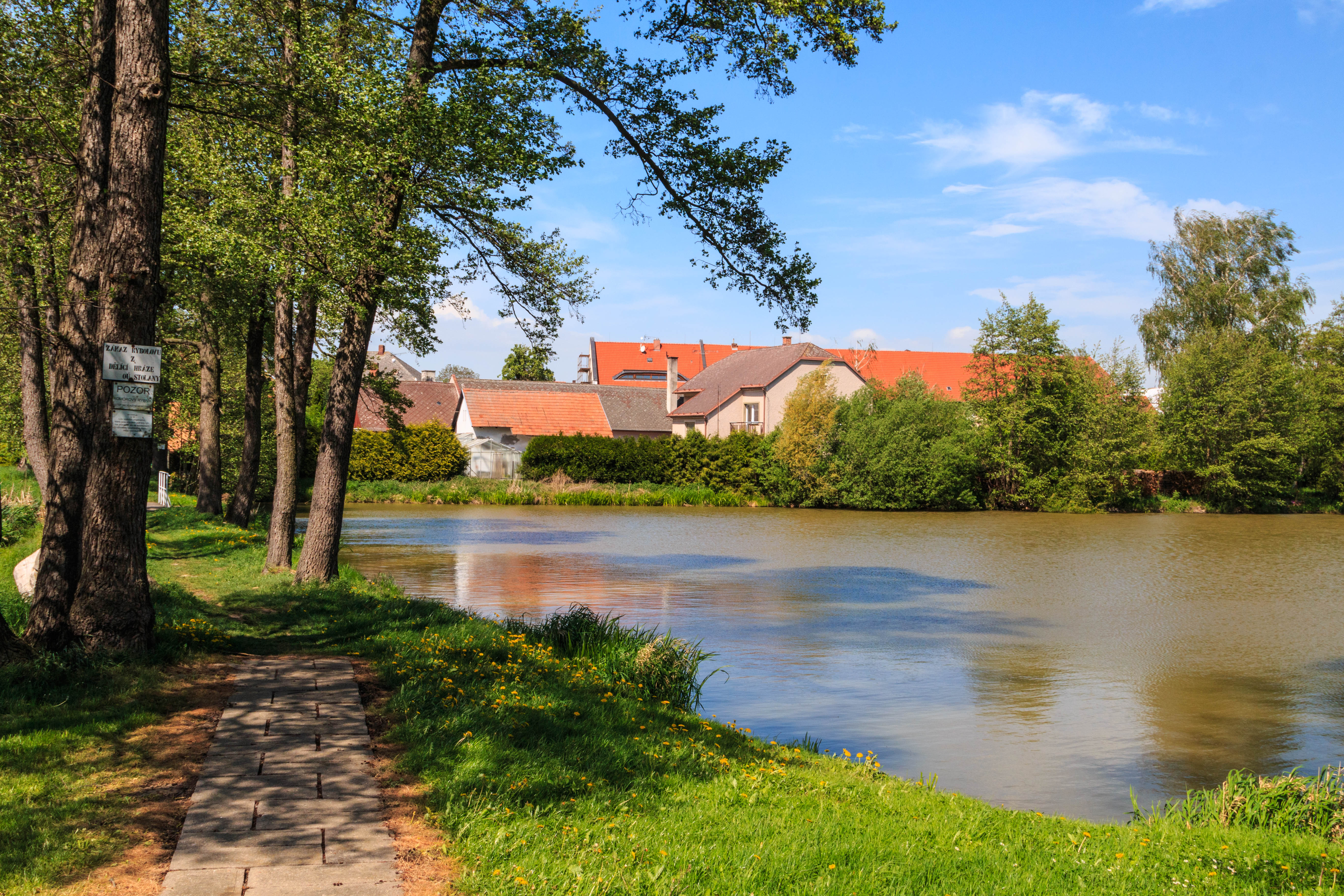 Panský rybník ve Stolanech Project: Vodstvo.